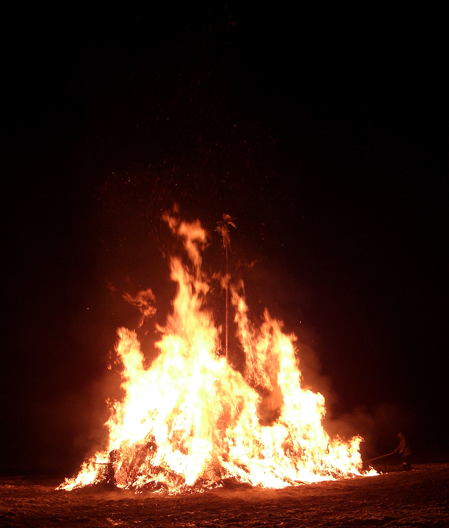 Funkenfeuer in Amendingen am 28. Februar 2009